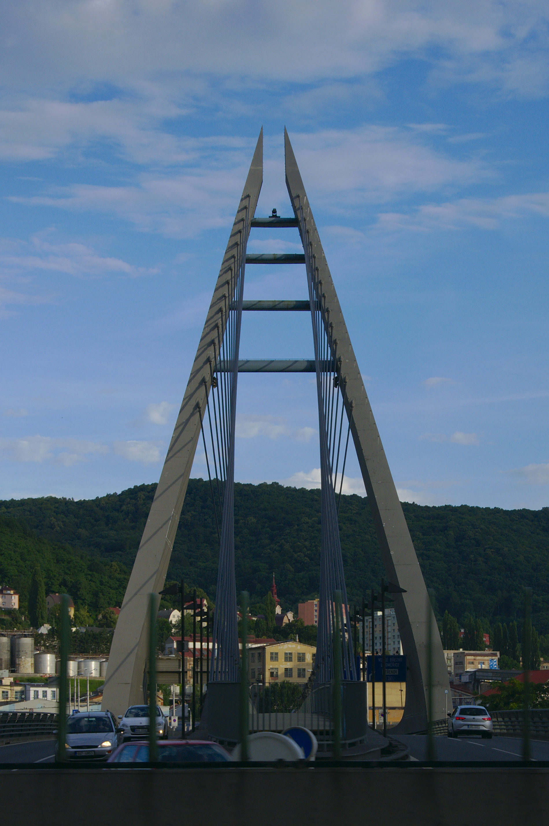 Mariánský most, Ústí nad Labem